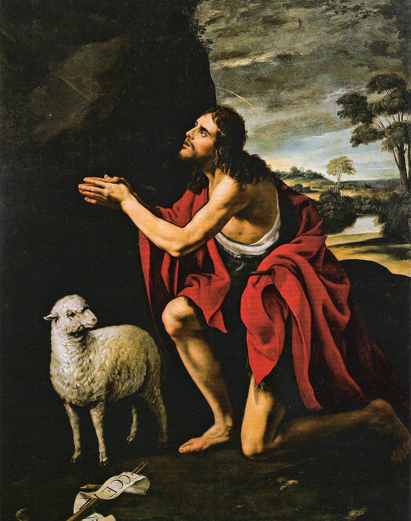 Juan van der Hamen y León - Johannes der Taüfer beim Gebet